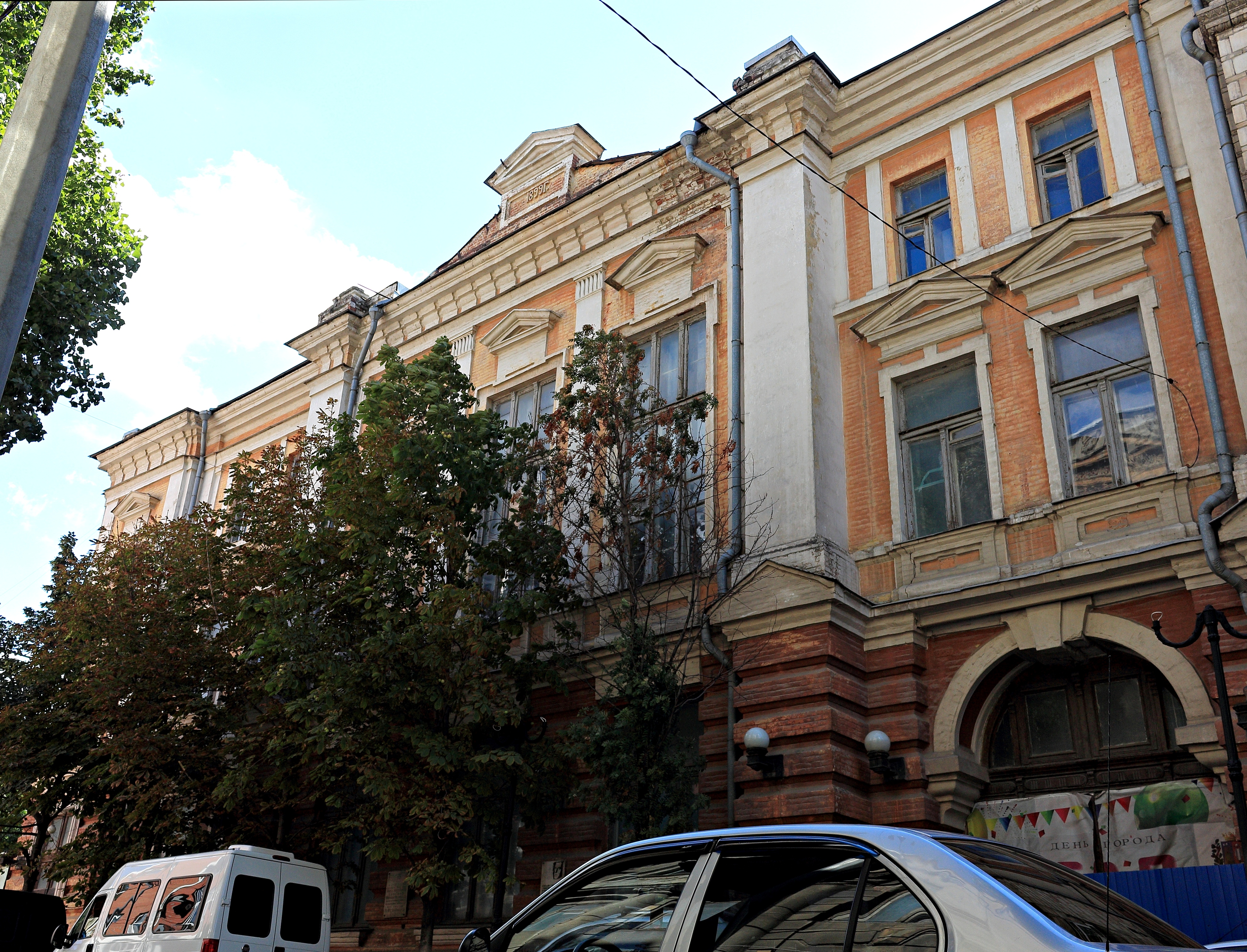 Клуб приказчиков (Дом, в котором проходил I съезд Советов Донской Советской республики): улица Серафимовича, 88, Ростов-на-Дону, Ростовская область